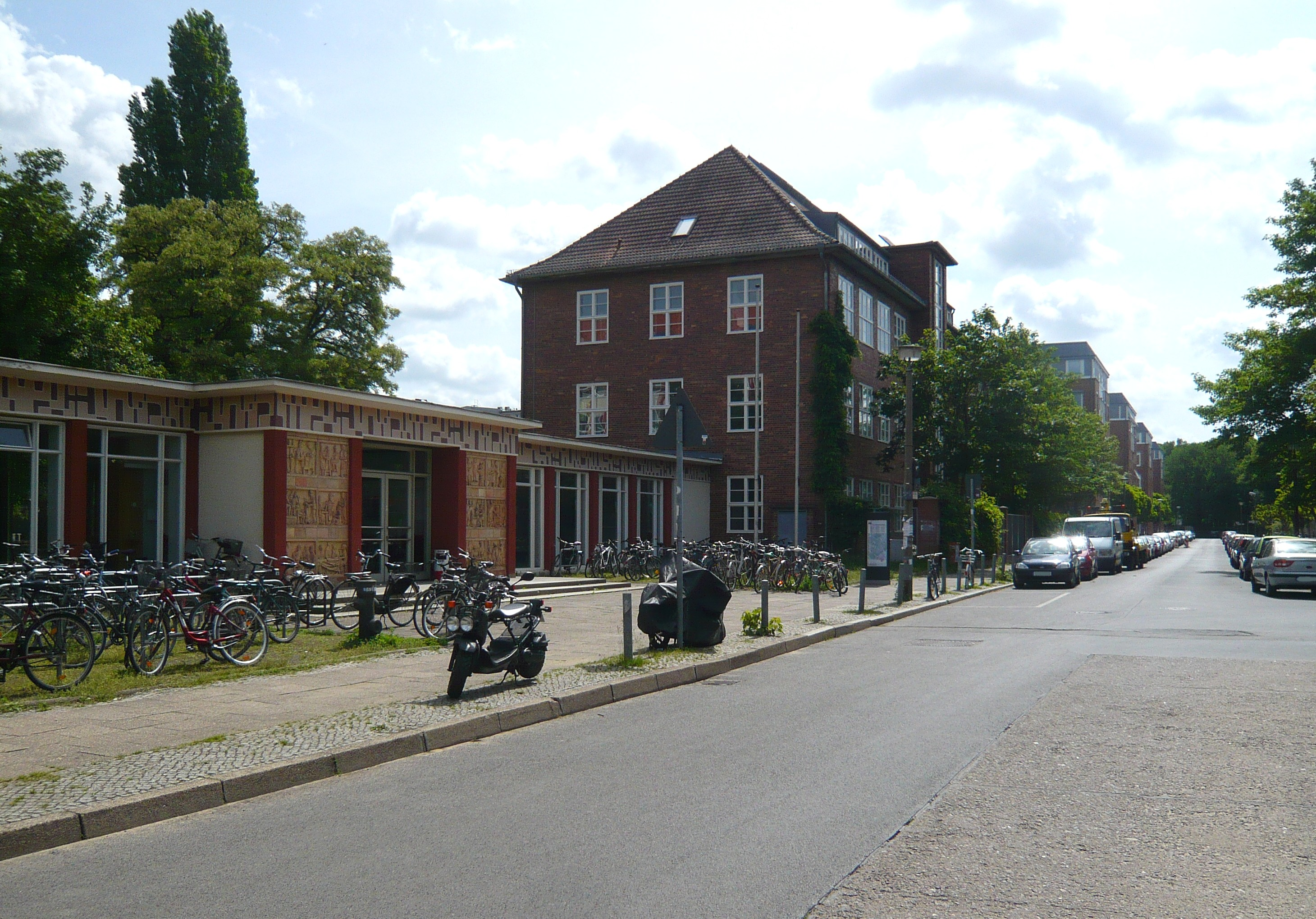 Weißensee, Bühringstr.